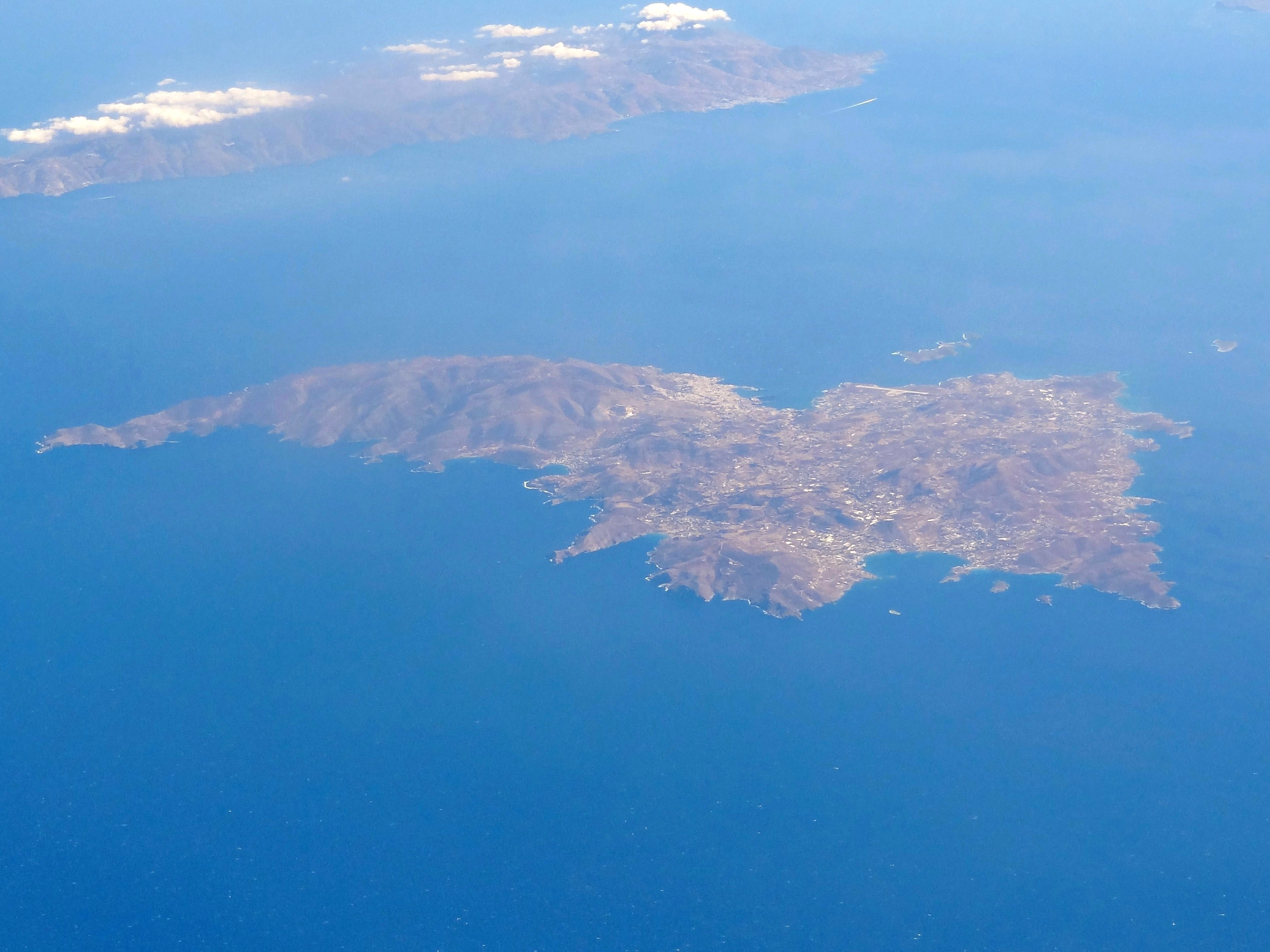 Insel Syros (Σύρος), Gemeinde Syros-Ermoupoli, Kykladen, südliche Ägäis, Griechenland